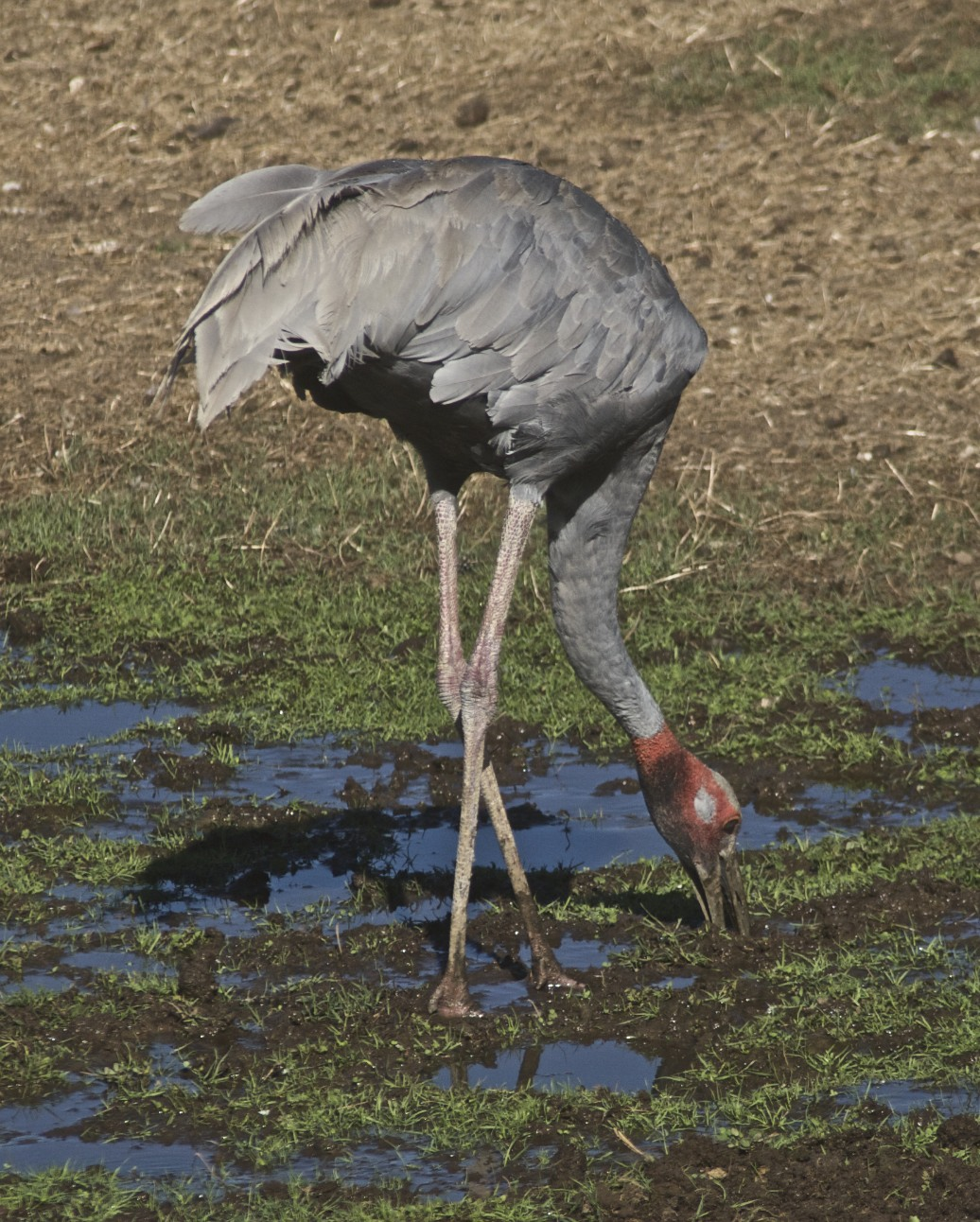 Grus antigone Sarus Crane